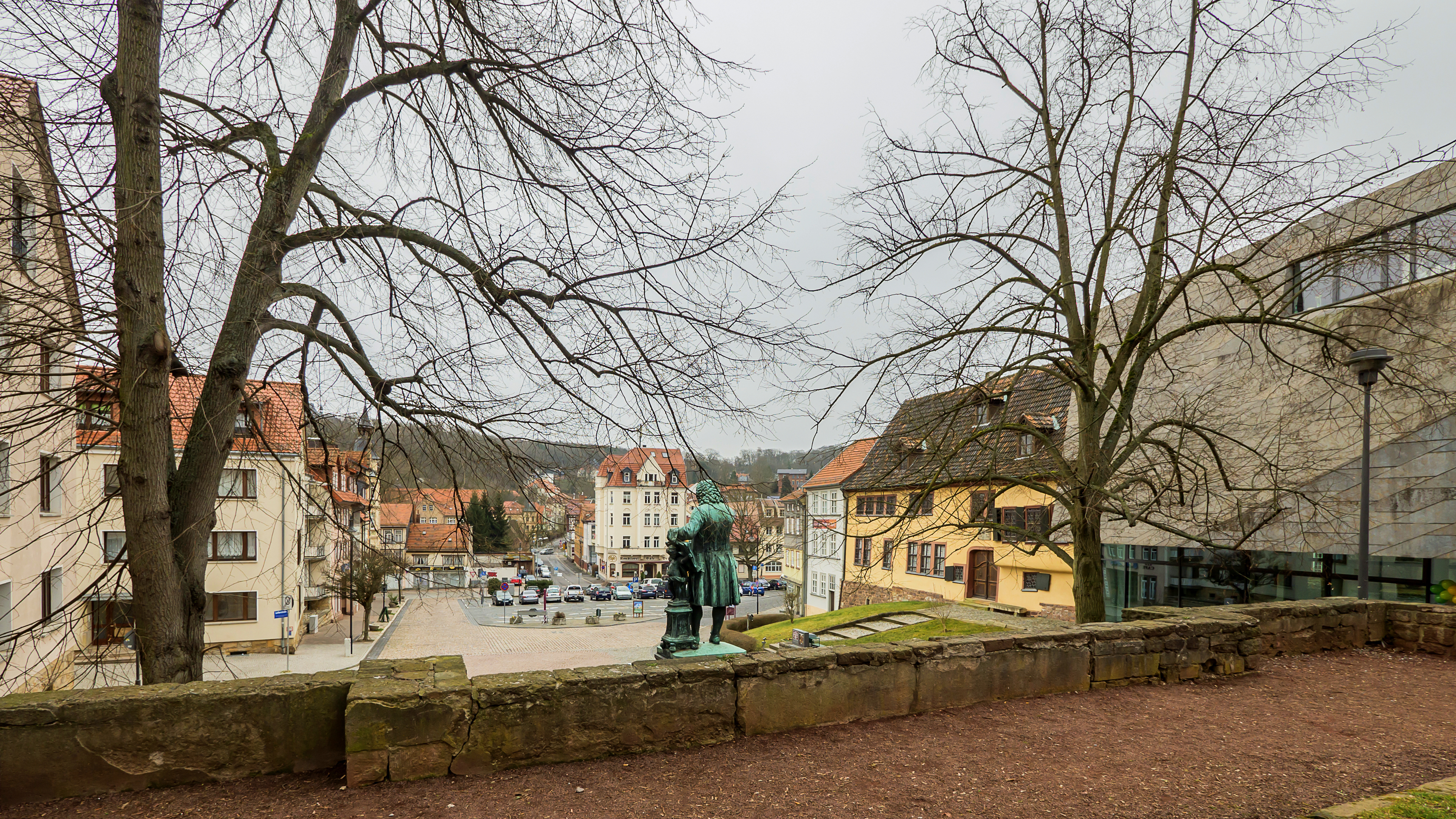 Eisenach Frauenplan Bachhaus Bachdenkmal